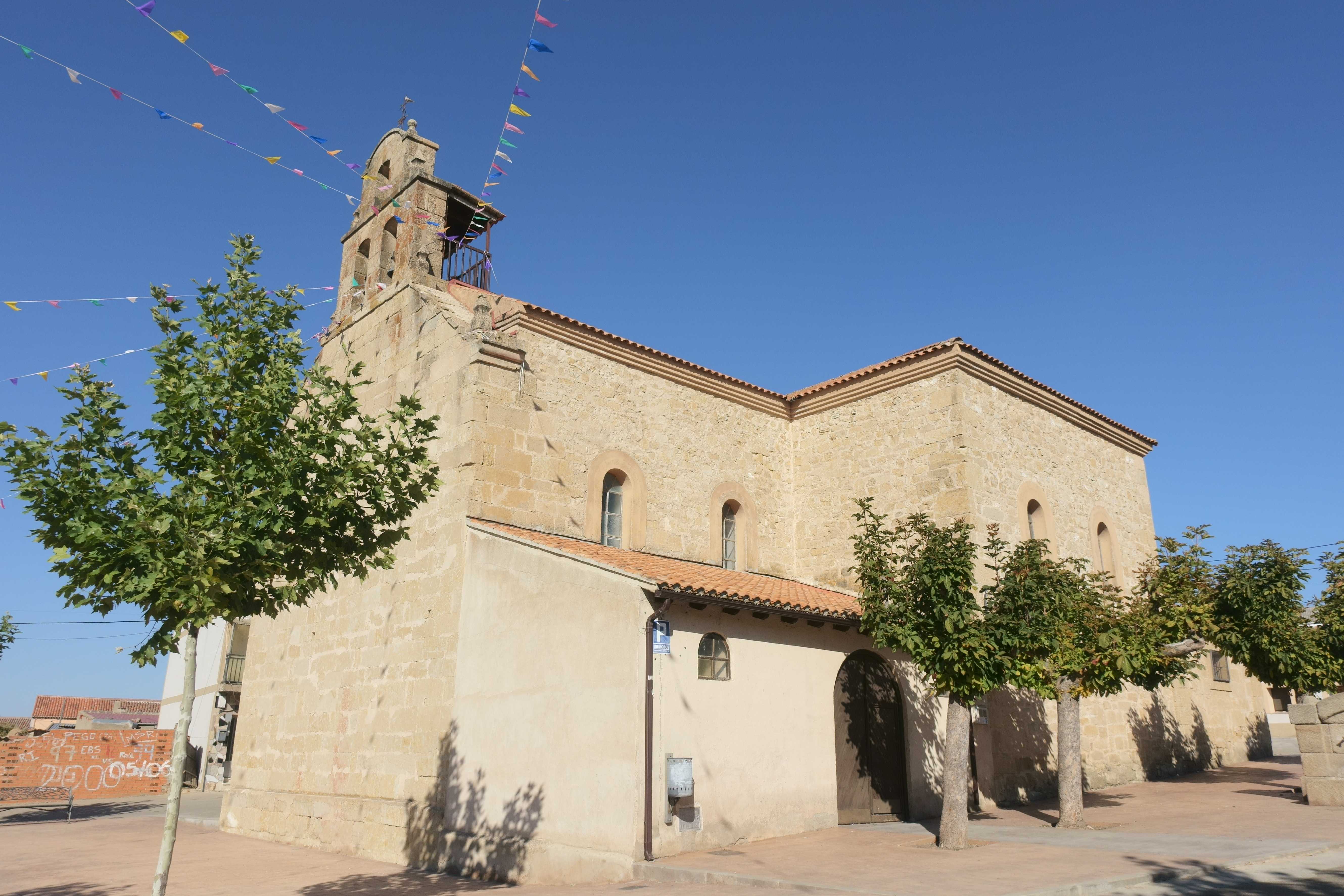 Iglesia de San Clemente, El Pego (Zamora, España).